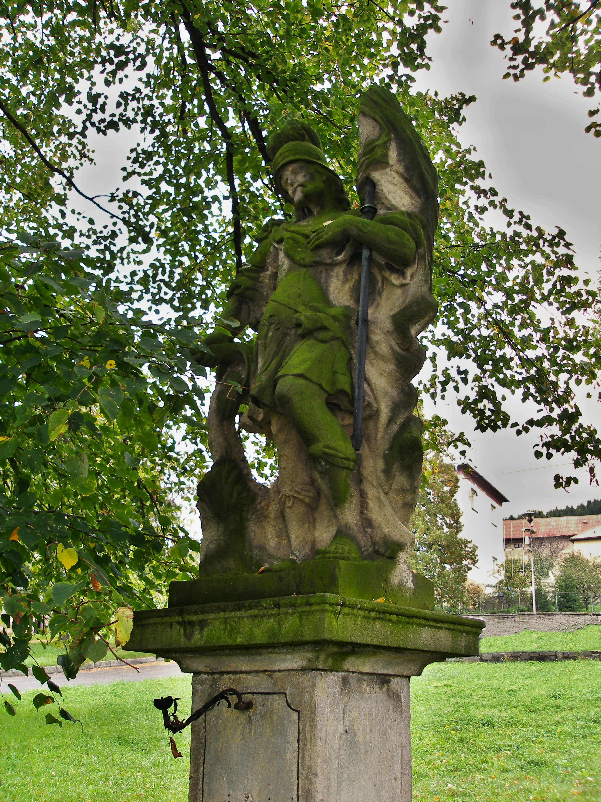 Socha sv. Floriána (Bílavsko), náves, Bílavsko, Bílavsko.